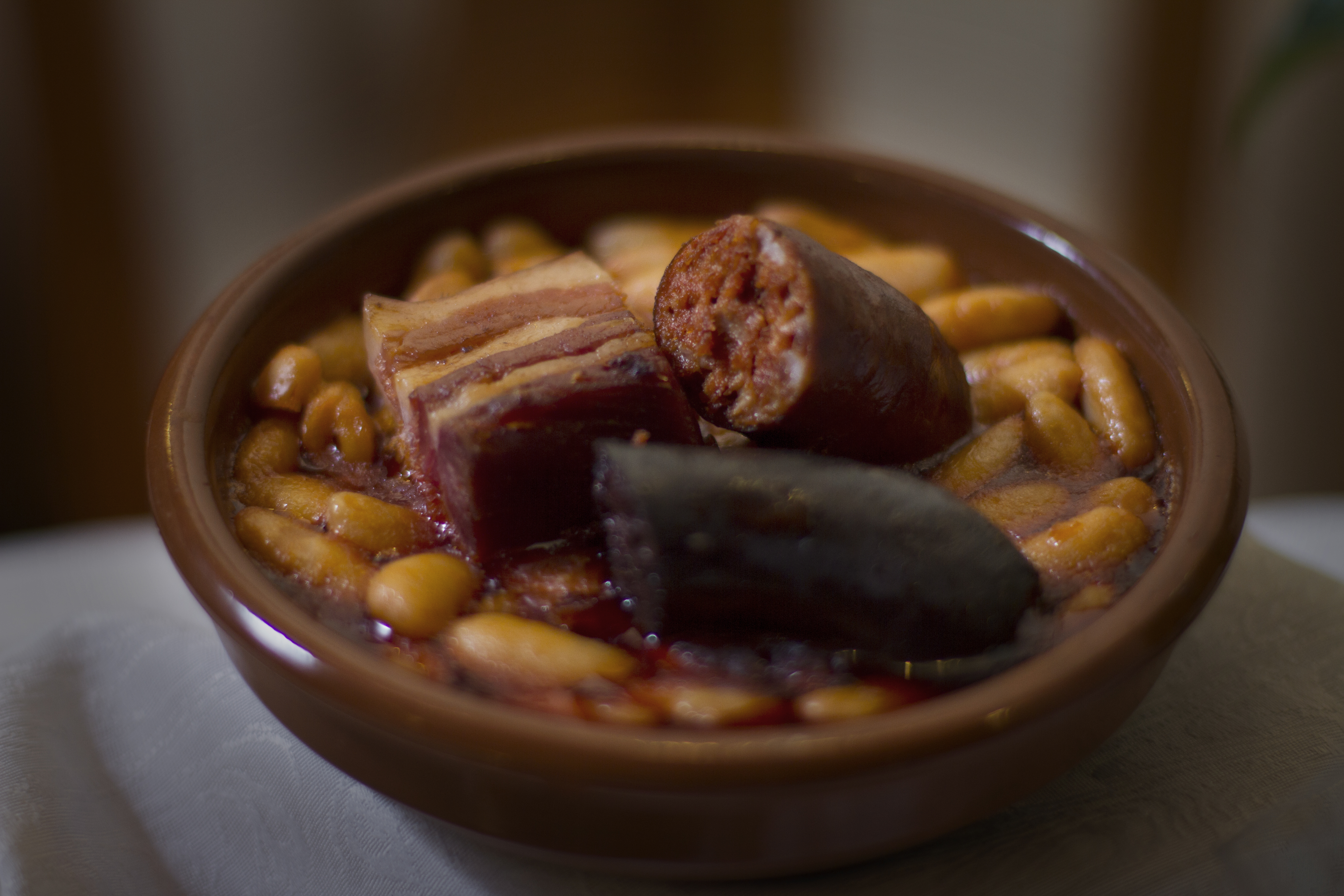 Fabada Asturiana y Compangu